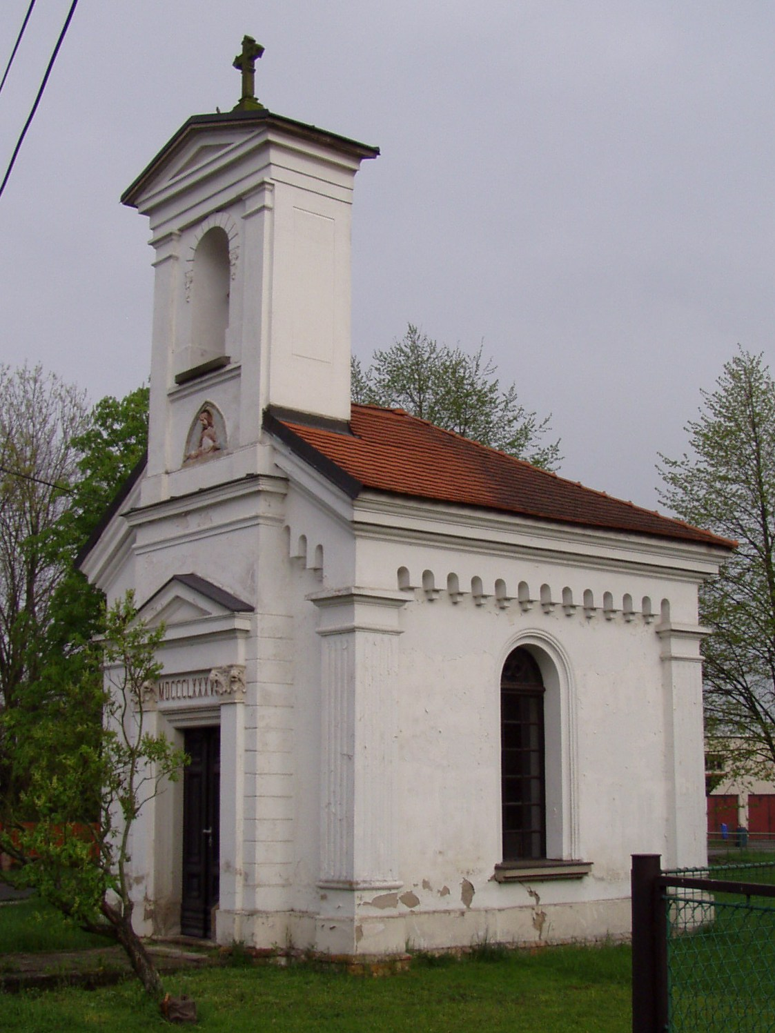 Kaple Nanebevzetí Panny Marie (Čánka)